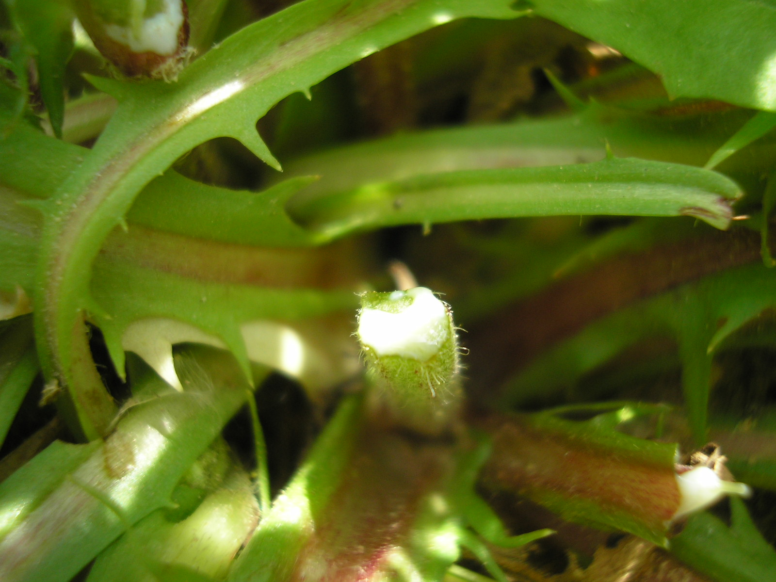 Crepis tectorum